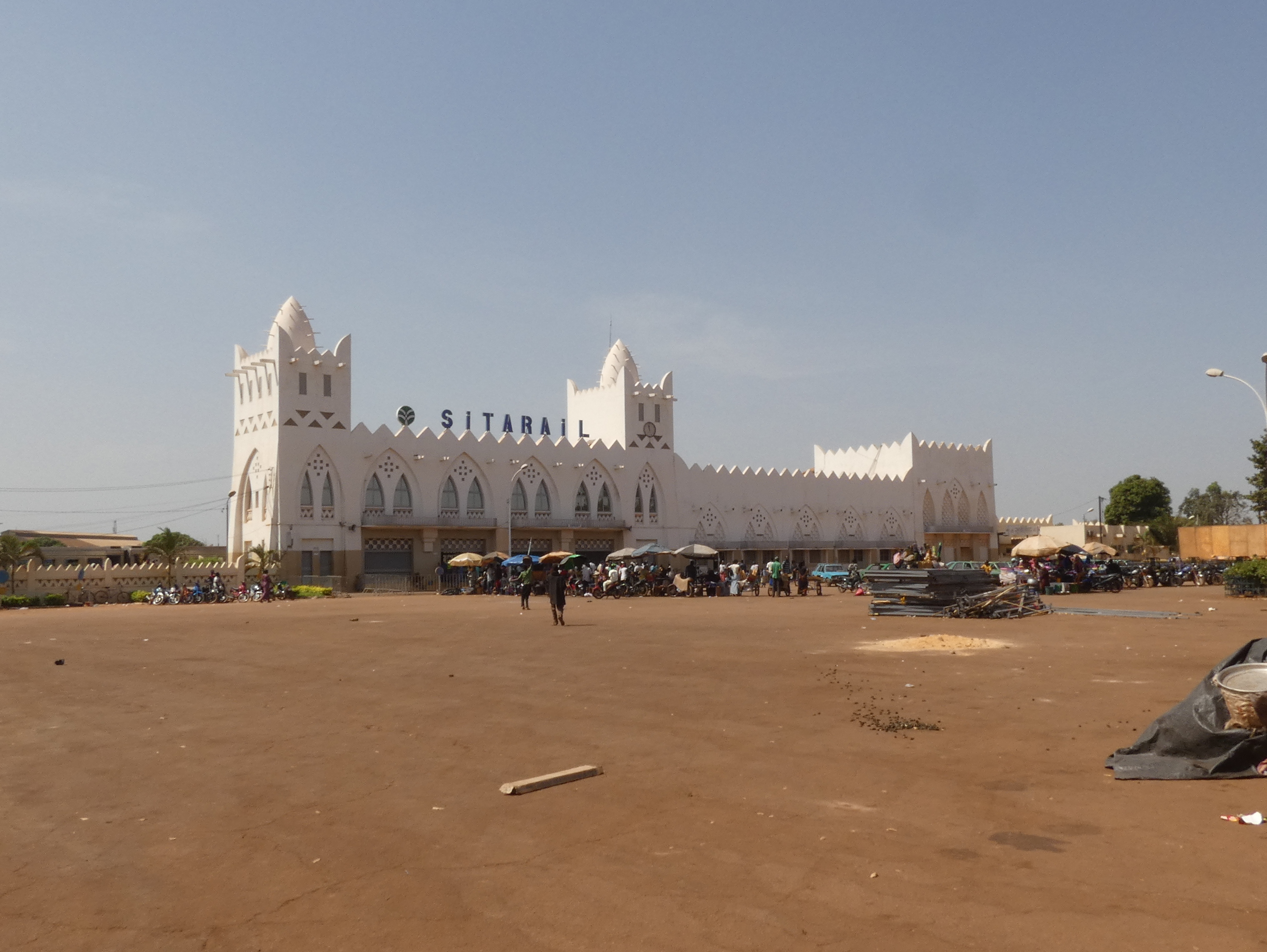 Bahnhof Bobo-Dioulasso